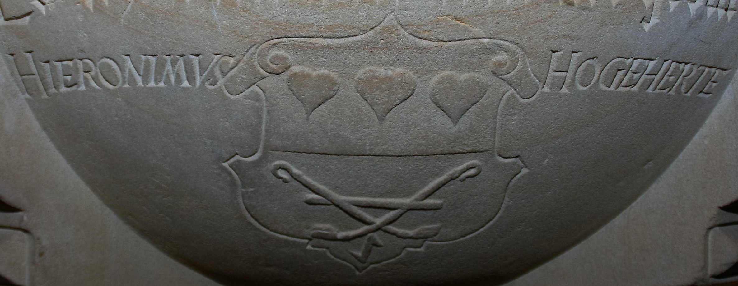 Das Wappen des Hieronimus Hogerte auf dem Sendenhorster Taufstein von 1588, der sich in der St. Laurentiuskirche in Ennigerloh-Westkirchen befindet.